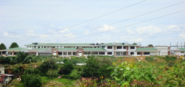 Nueva sede de Electrificadora del Caquetá S.A. ESP en Florencia (Caquetá)